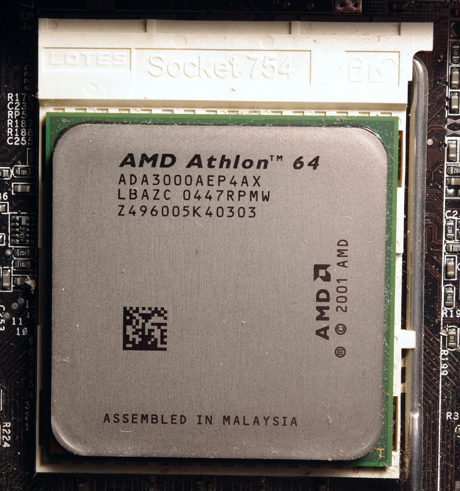 AMD Athlon für Sockel 754